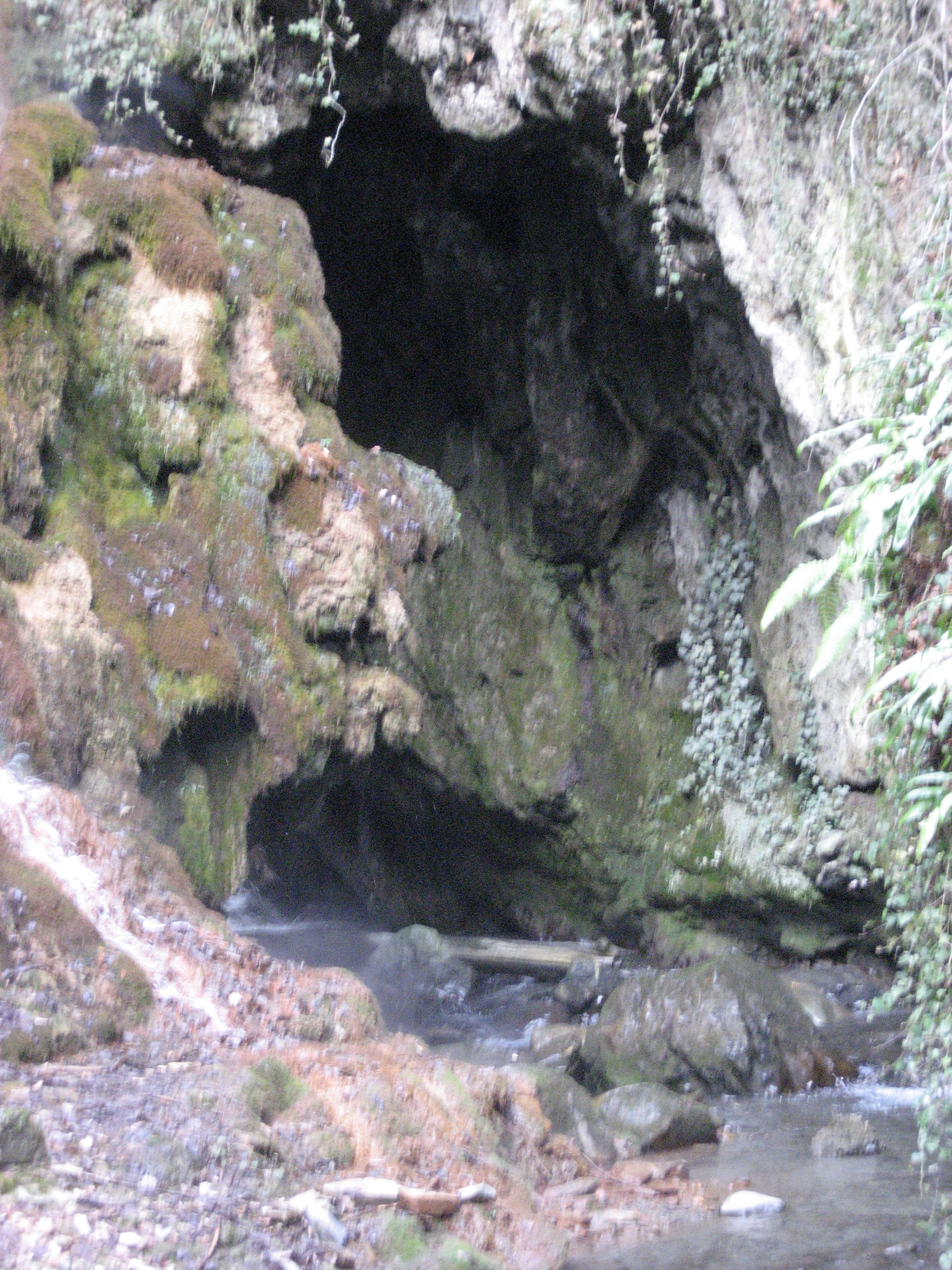 Schlucht der Salentze bei Saillon, wo Farinet ums Leben kam